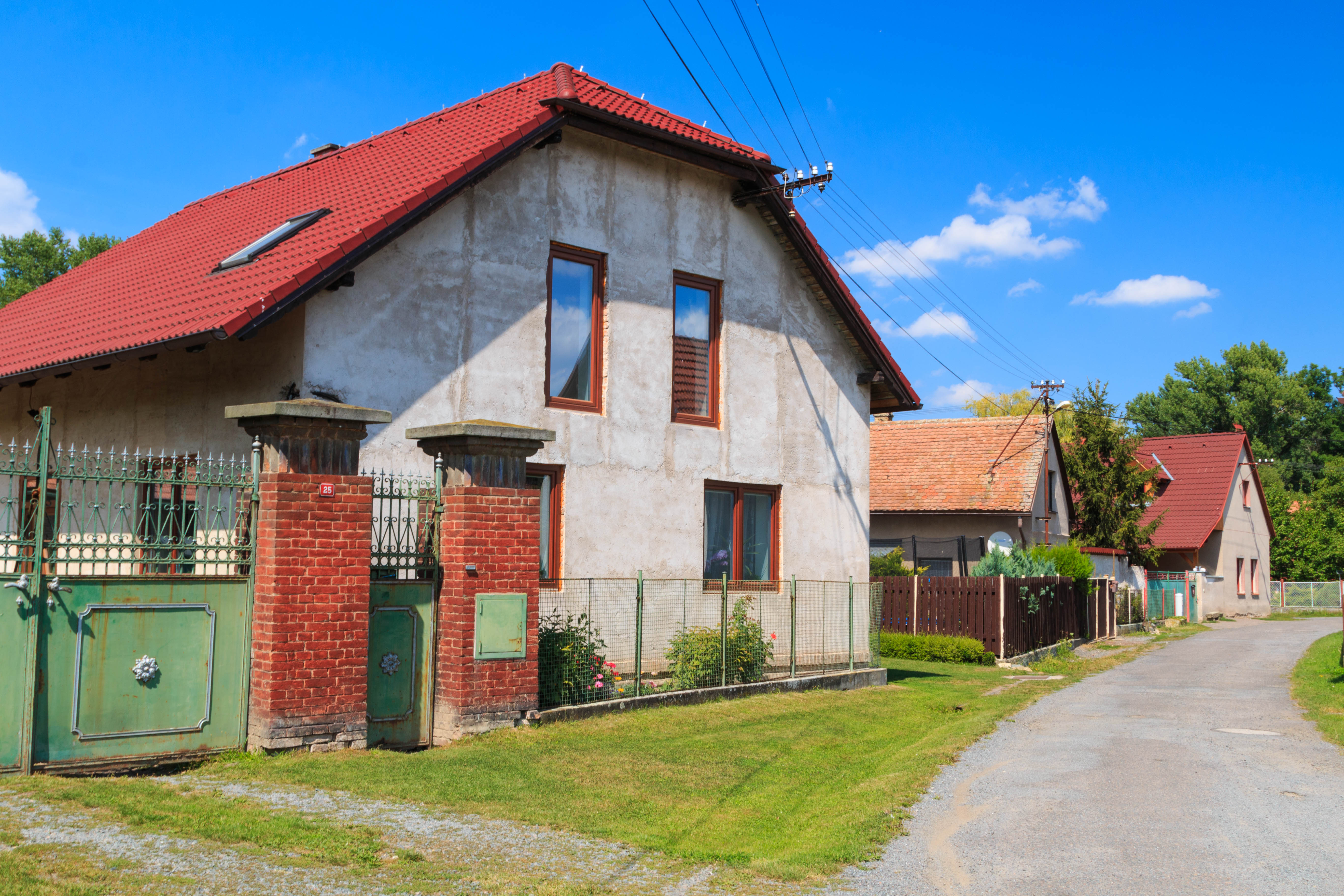 Synčany - čp. 25